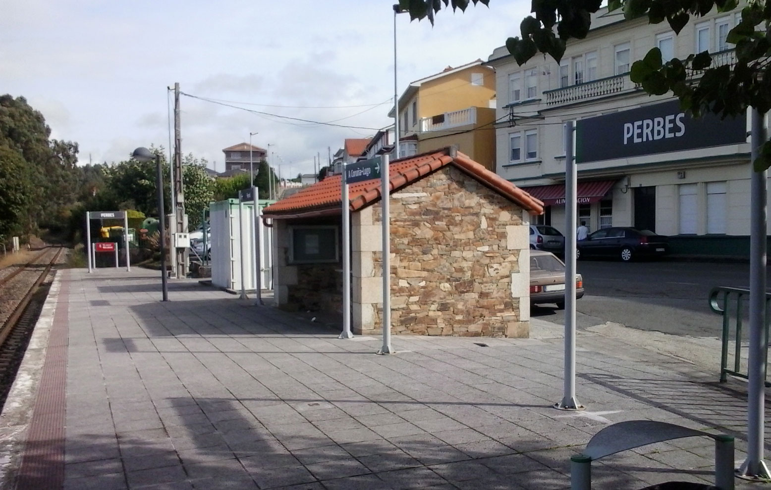 Apeadoiro de Perbes Renfe, concello de Miño A Coruña Galiza Spain